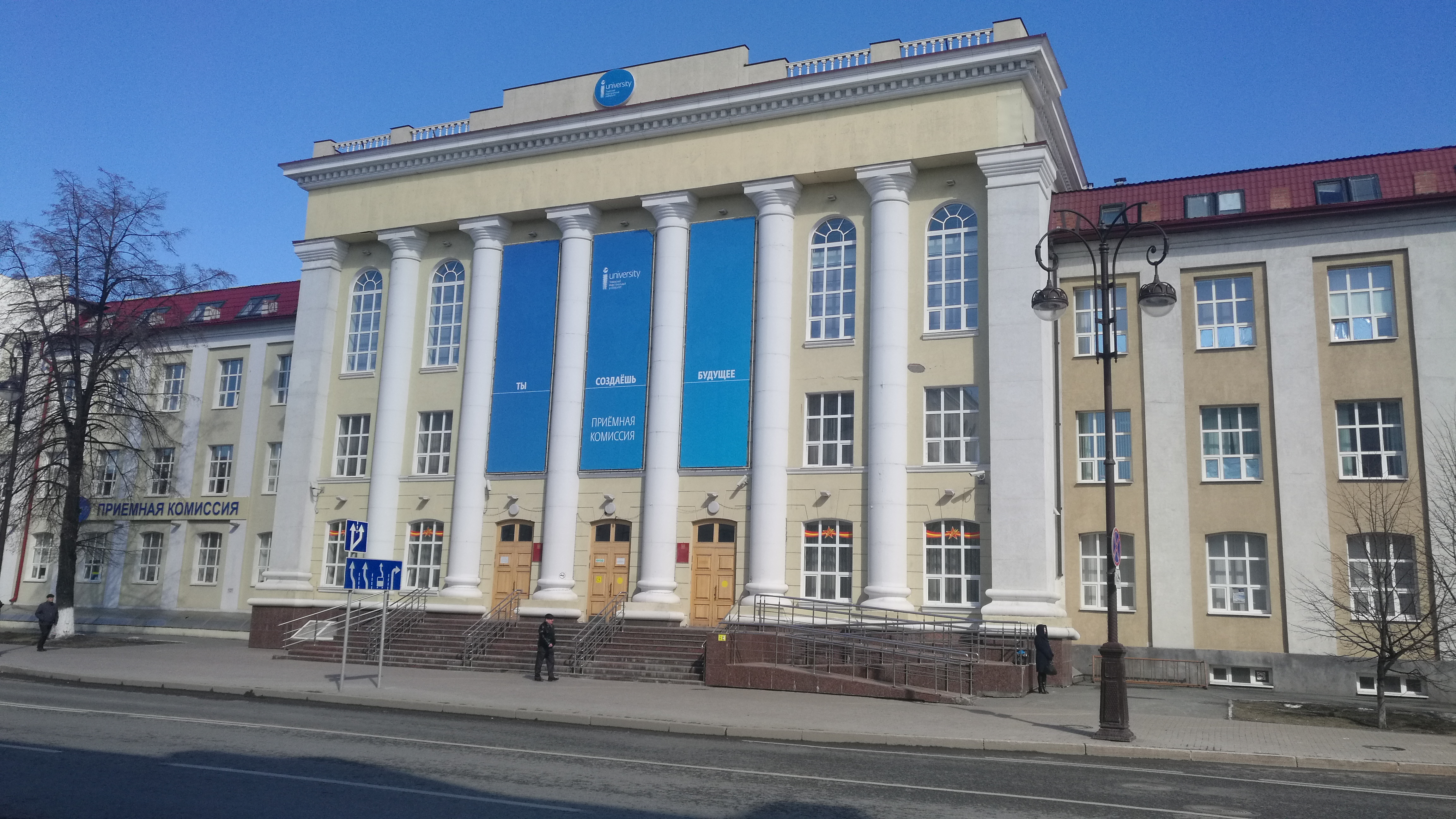 La Tjumena Industria Universitato. Tjumeno, Rusio.